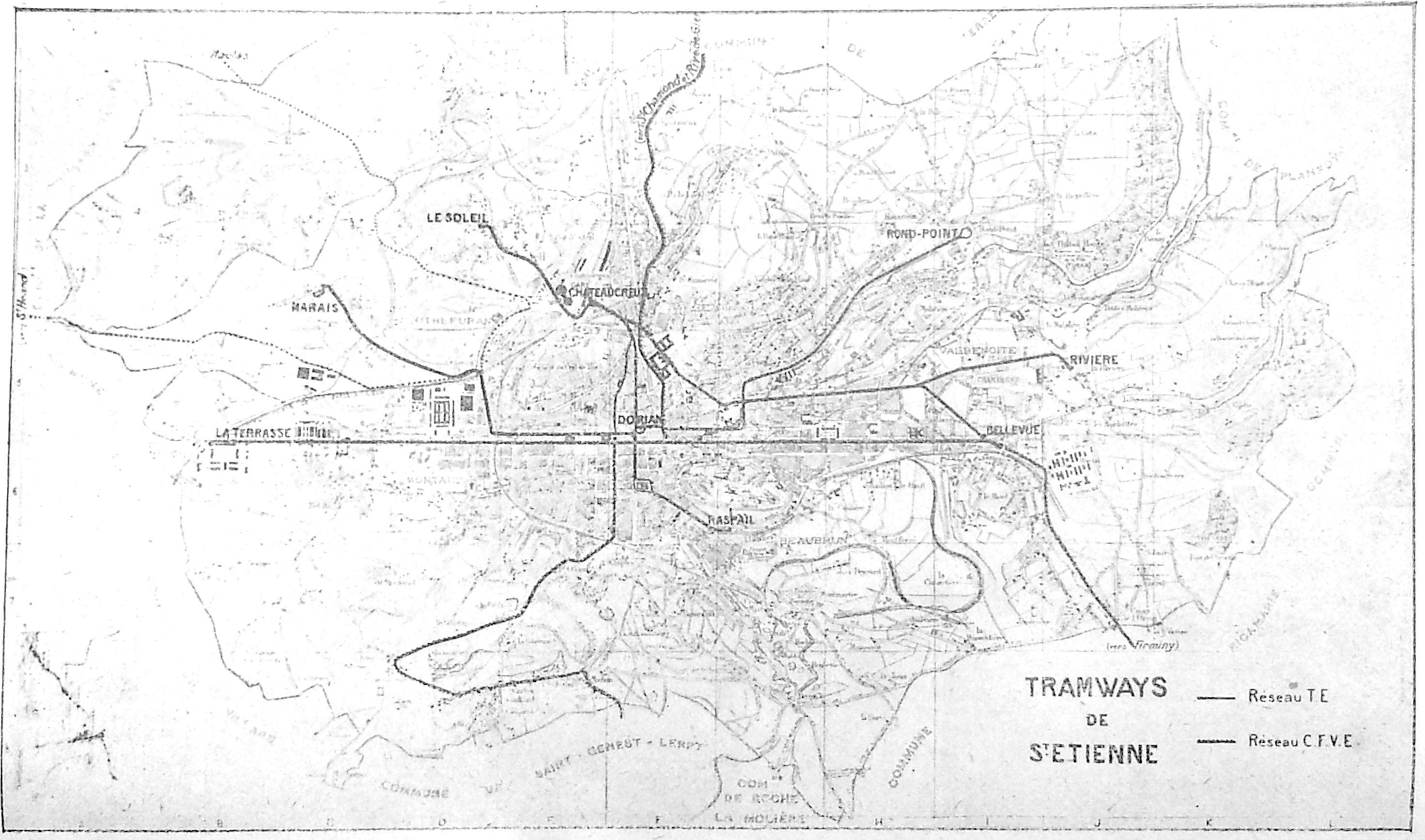 Plan du réseau des tramways de St-Etienne en 1928